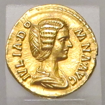 Palazzo Massimo alle Terme (Roma)